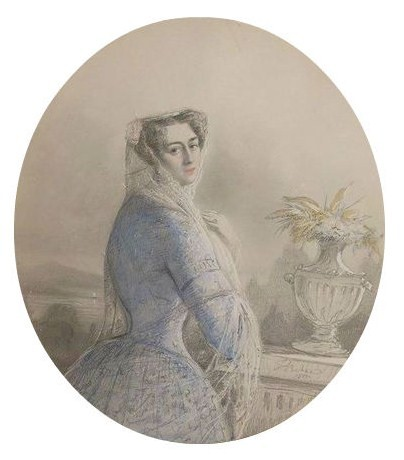 Мария Александровна Безобразова (1819-1863), дочь сенатора А. М. Безобразова, жена надворного советника Н. П. Шелашникова.